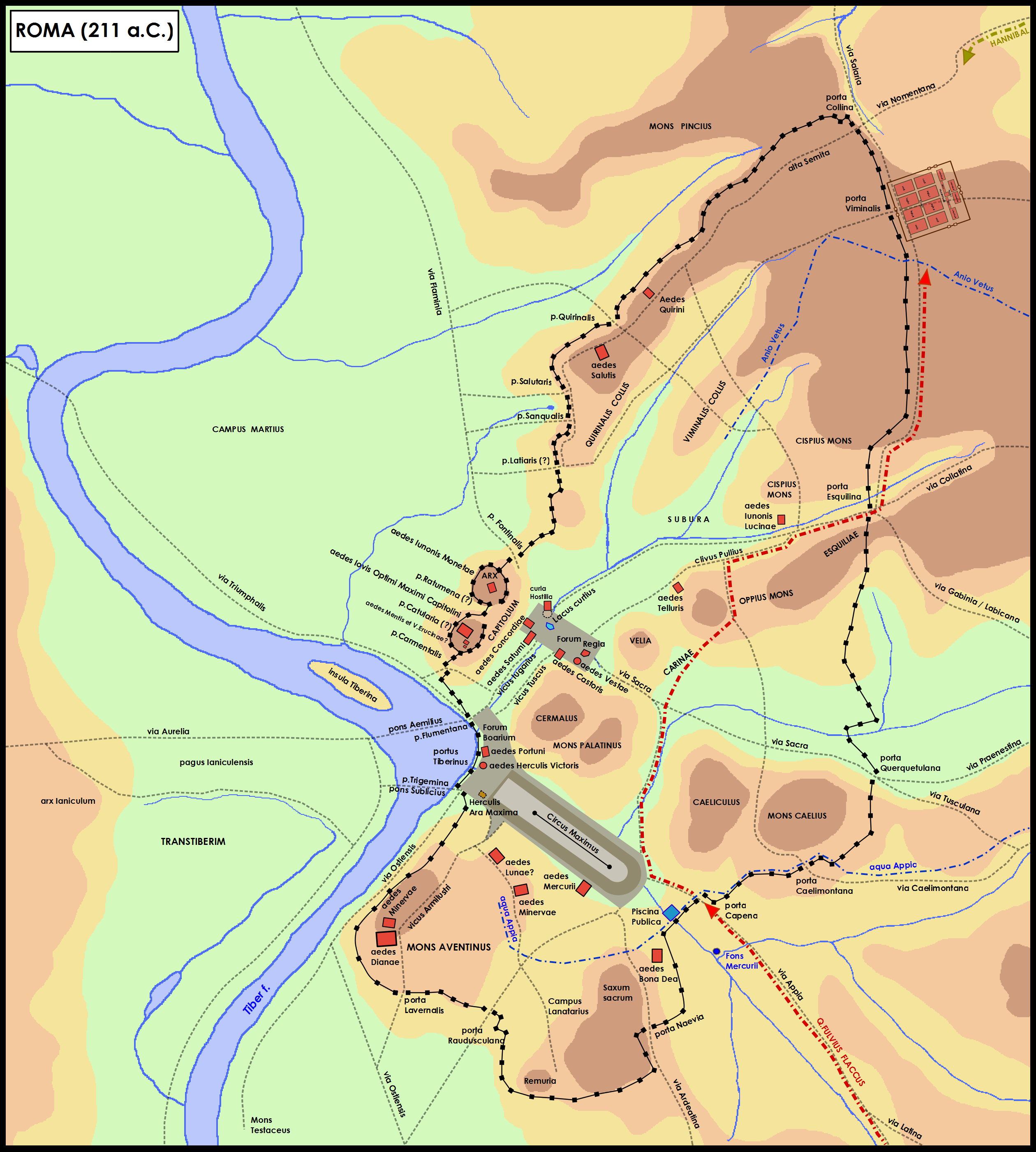 Marcia di Annibale su Roma. Fulvio Flacco difende la città con un esercito giunto da Capua (211 a.C.)